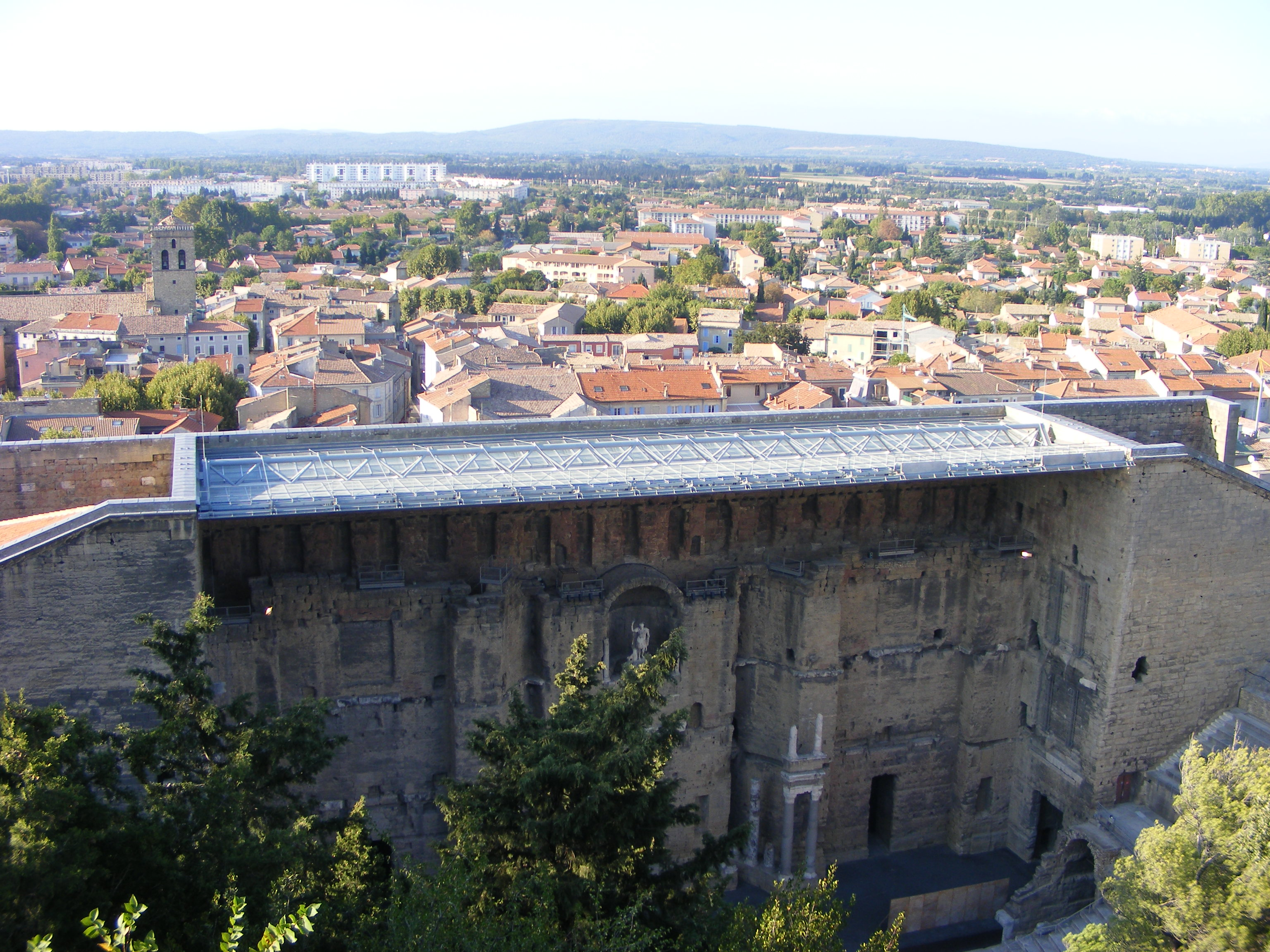 Théatre Antique d'Orange Détail du toit en verre installée en Juin 2006.